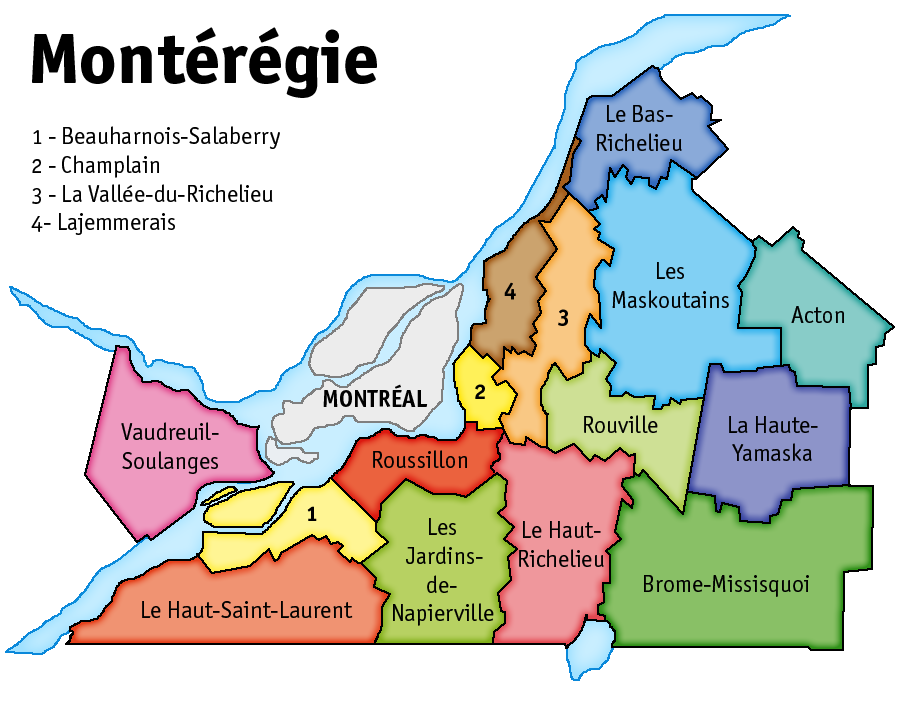 Mapa de la región quebequesa de Montérégie. Hecho por mí mismo, Mortadelo2005.